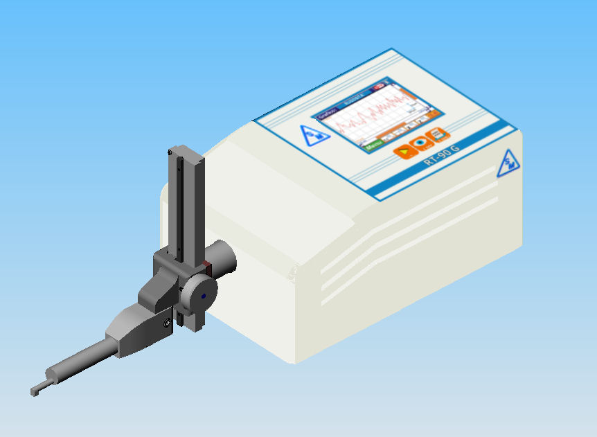 Immagine di un rugosimetro portatile con display LCD a colori Immagine creata da Lucabu con un cad parametrico.